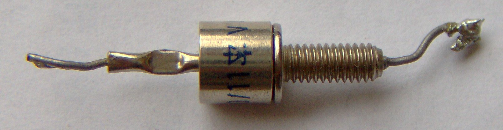 Electronic component - zener diode